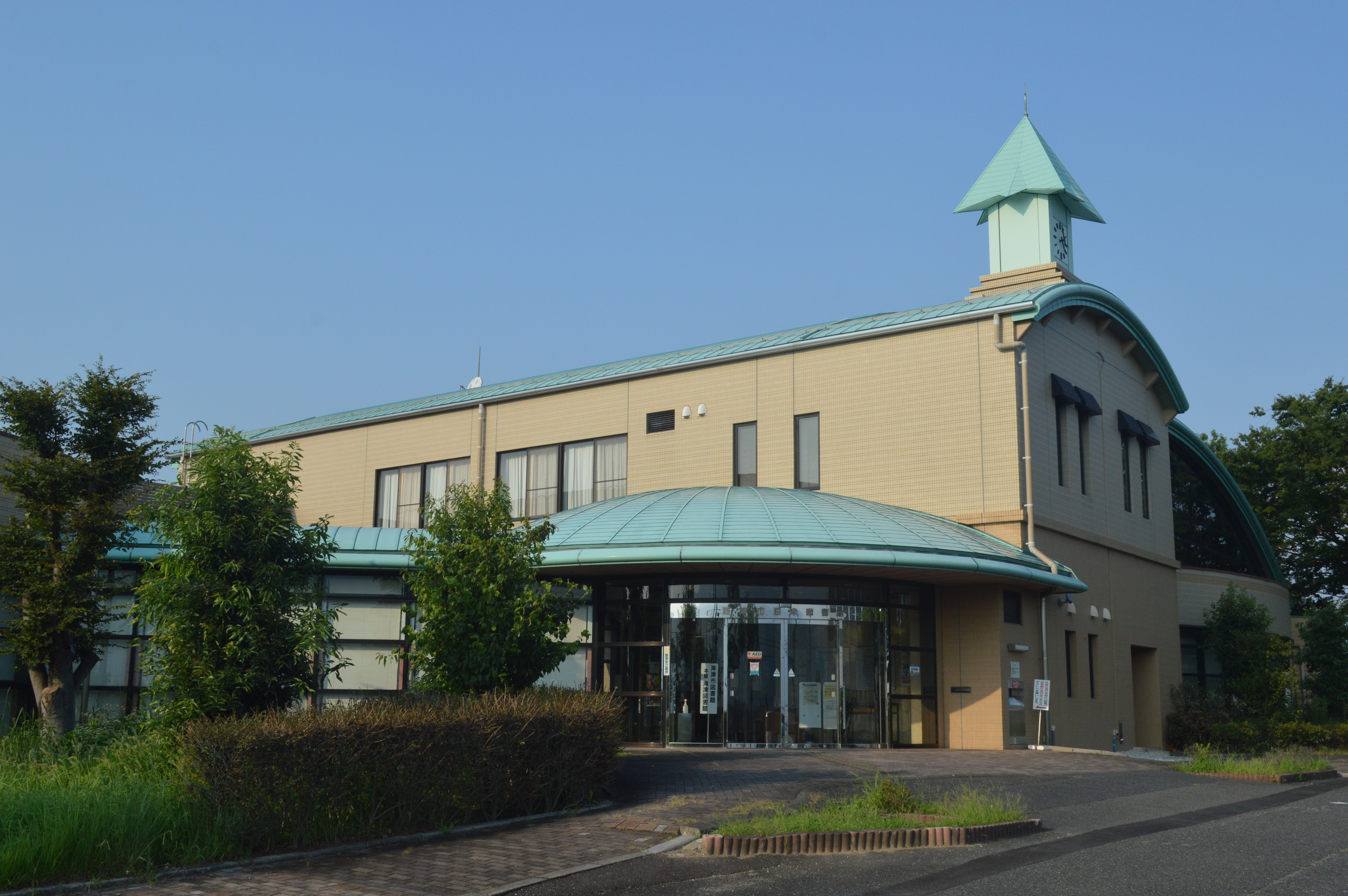 岐阜県海津市にある海津市立海津図書館。